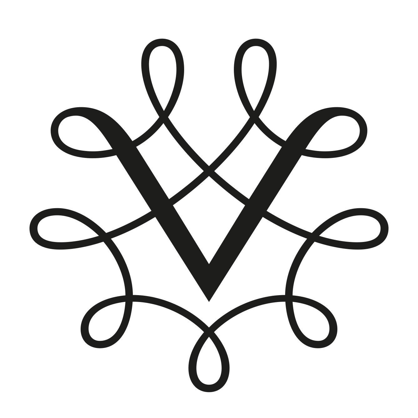 Det var tegner og kunstner Hermann Bongard som i 1956 kom fram til symbolet vi i dag kjenner så godt. På 50-tallet hadde Vinmonopolet behov for et mer dekorativt emblem for anvendelse på etiketter. Dette viste seg å være en krevende oppgave. Løsningen ser svært enkel ut, men bunken av mislykkede utkast fra forskjellige, til dels meget kompetente tegnere, viser at oppgaven ikke har vært lett.